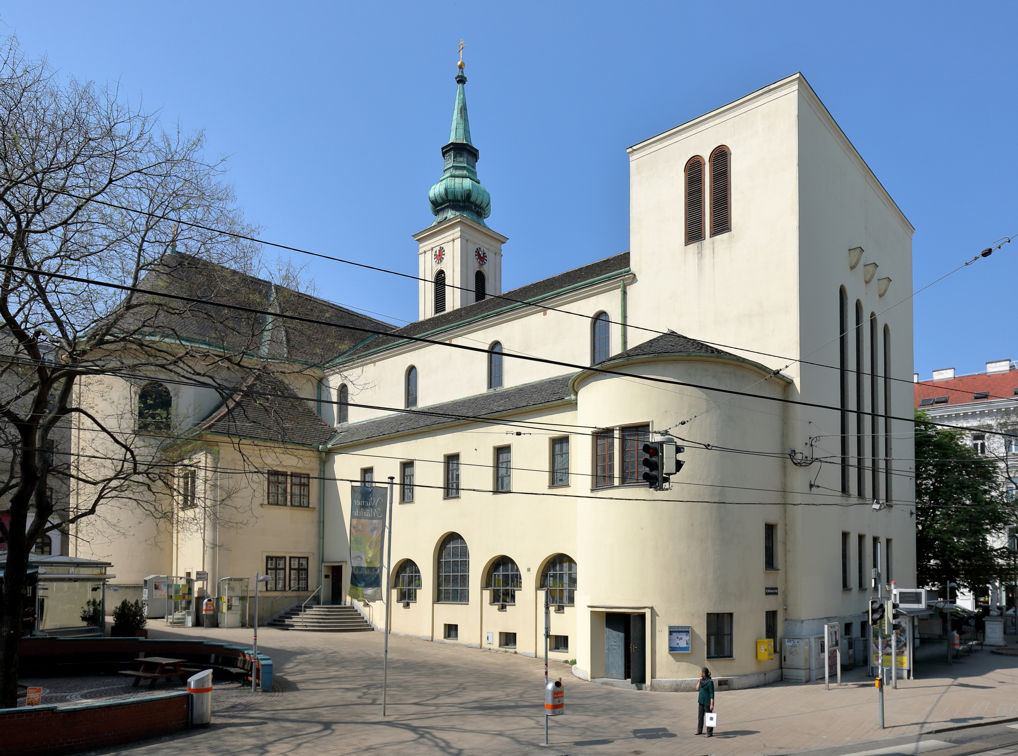 Nordostansicht der röm.-kath. Pfarrkirche hl. Gertrud im 18. Wiener Gemeindebezirk Währing.Im Vordergrund der Anbau an die Nordseite der ursprünglichen Kirche. Dieser Anbau, ein großer multifunktionaler Kirchenraum mit rechteckigem Grundriss, erfolgte 1934 und der Altbau wurde ab 1753 anstelle einer einsturzgefährdenden Kirche neu errichtet. 1858 ersetzte man den alten Kirchturm durch einen westseitigen Fassadenturm und 1885 erfolgte der Bau eines Portalvorbaues an der Westseite.